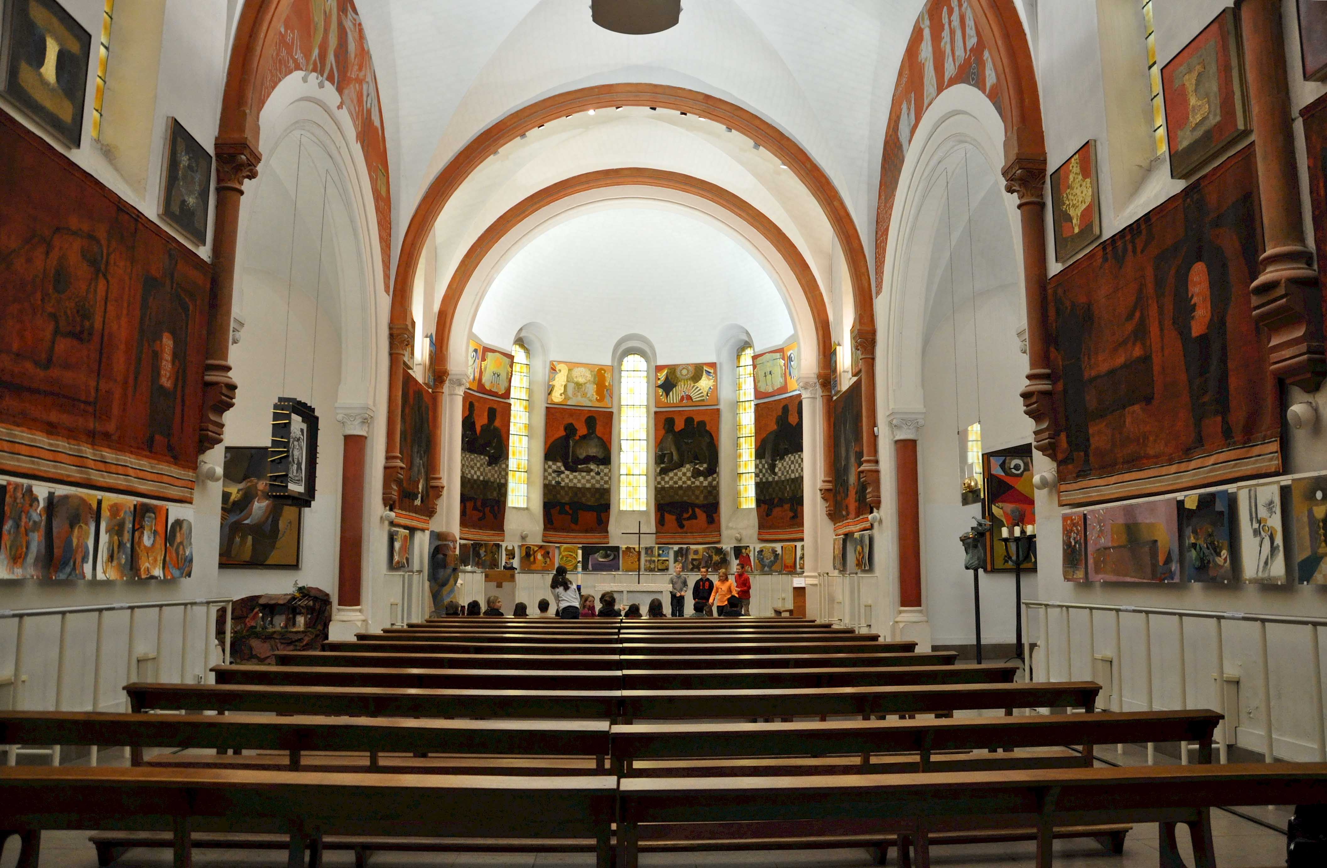 © Maurice Gonnard